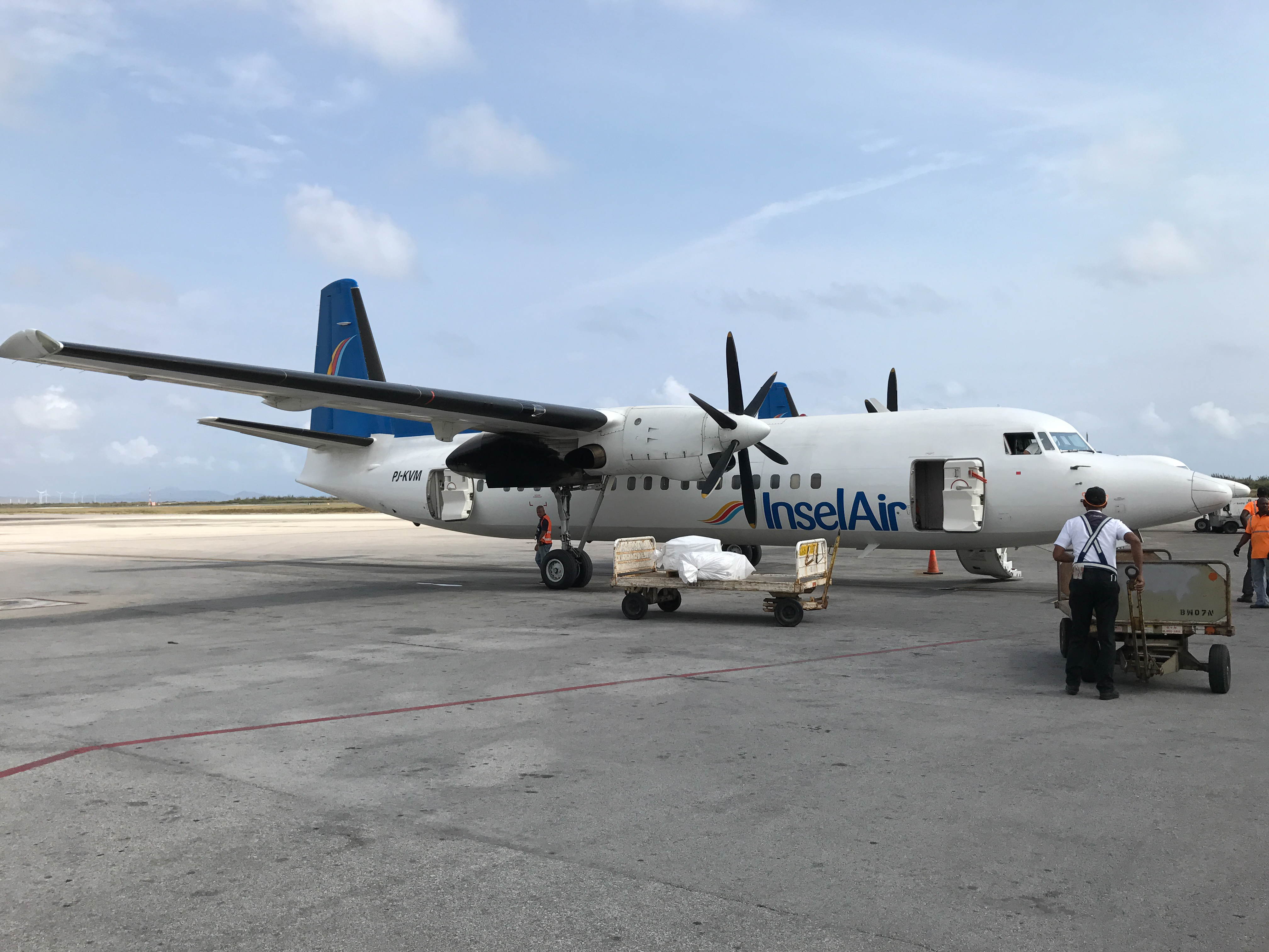 Insel Air Curacao Bonaire Curacao